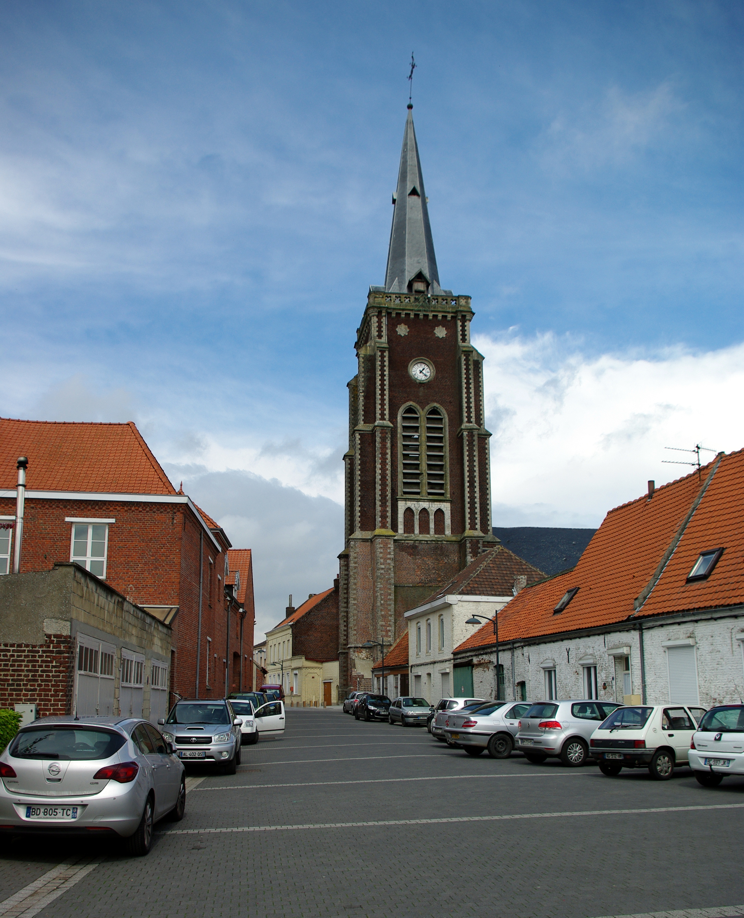 Eglise Saint Jean-Baptiste, Rue de l'Abbaye, Mons-en-Pévèle, département du Nord, région Nord-Pas-de-Calais, France